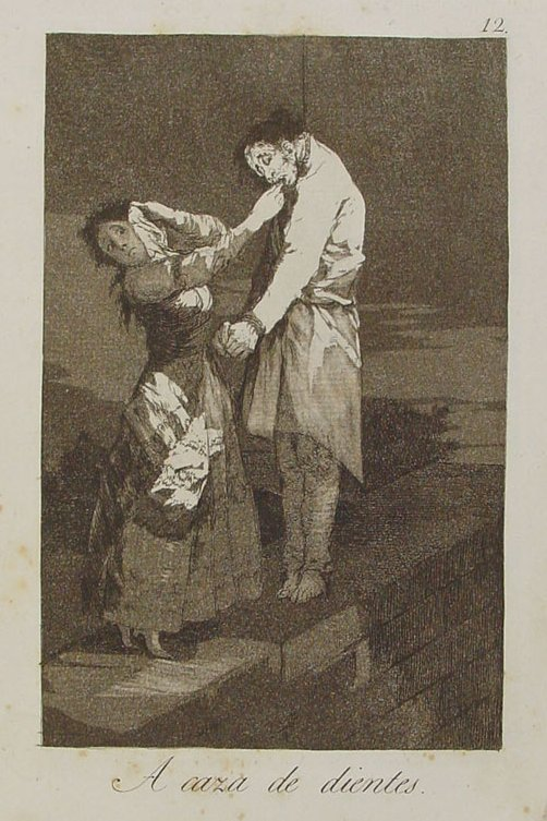 Capricho nº 12: A caza de dientes de Goya, serie Los Caprichos